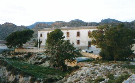 Casona histórica de La Hortichuela, pedanía molinense más al norte, propiedad del Conde de Roche